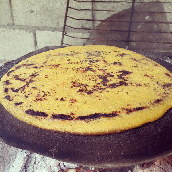 Tortilla Asada hecha en la Provincia de Veraguas, República de Panamá.